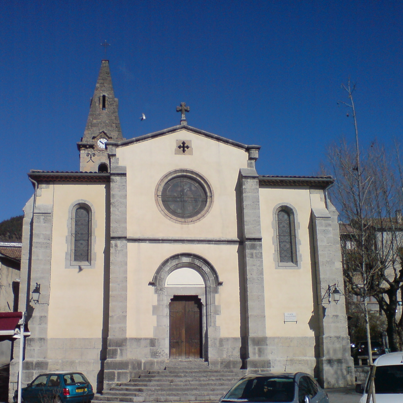 Description Façade de l'église de Barrême ; on y voit un œil-de-bœuf et une ouverture non-vitrée en forme de croix tréflée ; clocher couvert de pierres ; pigeon en plein vol Datevoir métadonnéesSourceOwn work by the original uploaderAuthorÉpiméthée Façade de l'église de Barrême ; on y voit un œil-de-bœuf et une ouverture non-vitrée en forme de croix tréflée ; clocher couvert de pierres ; pigeon en plein vol